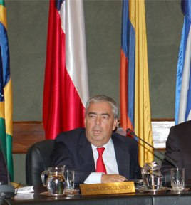 Bernardino Hugo Saguier Caballero Diplomático y político paraguayo.